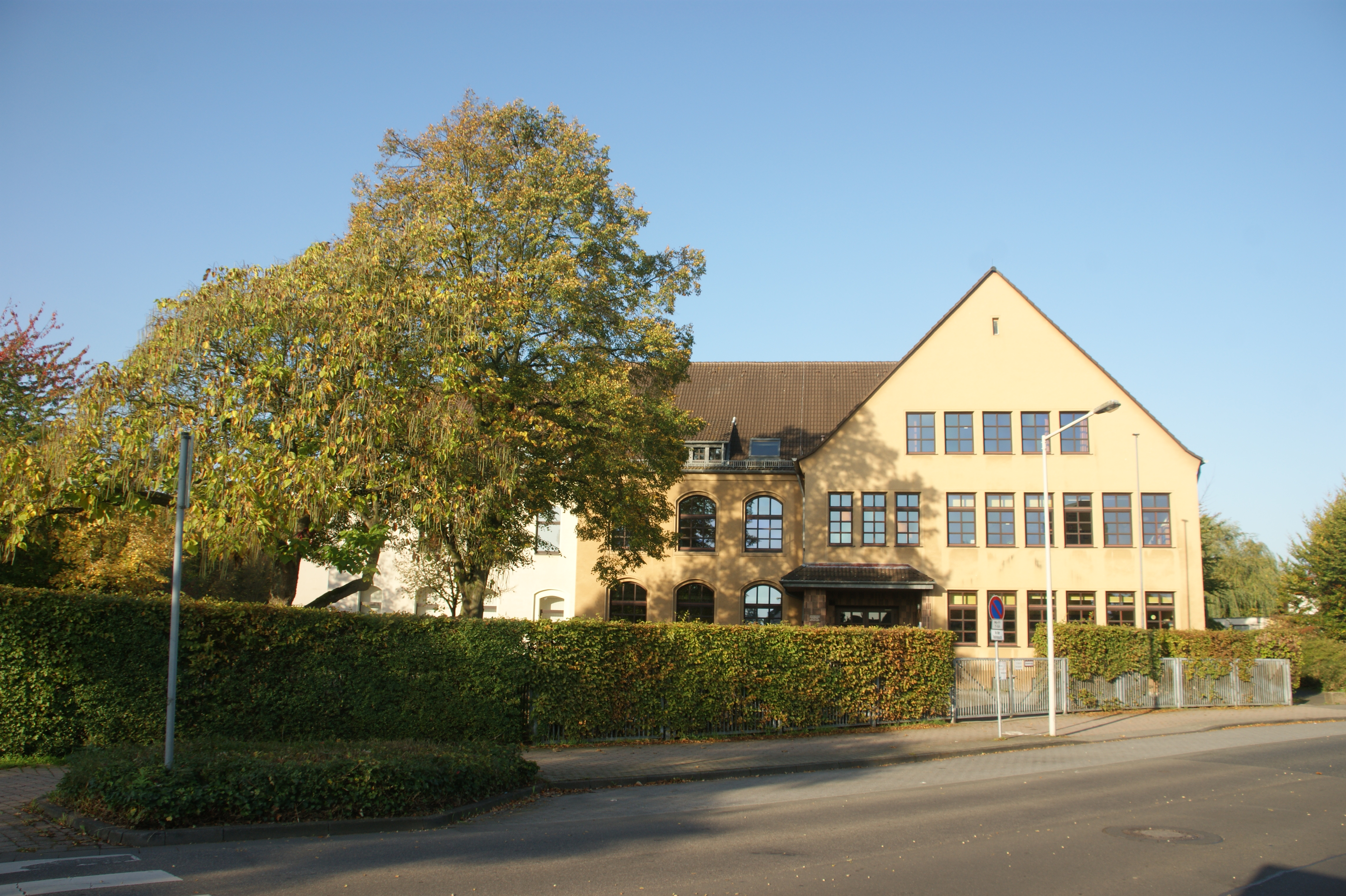 Grundschule Johannes-Schule in Königsdorf